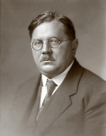 Prokop Maxa (1883 - 1961), Český a československý diplomat a politik.